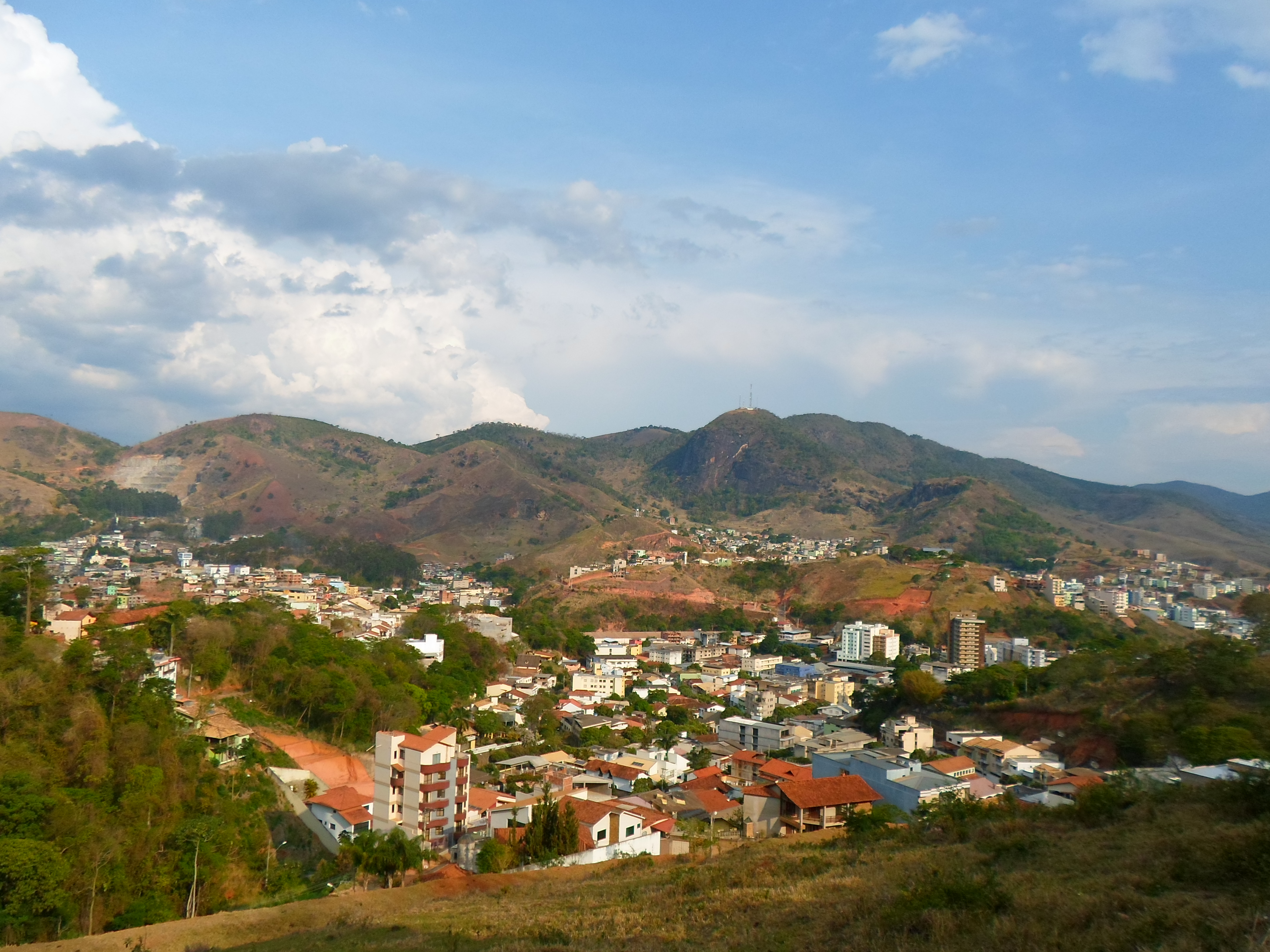 Vista de um novo bairro de Caratinga